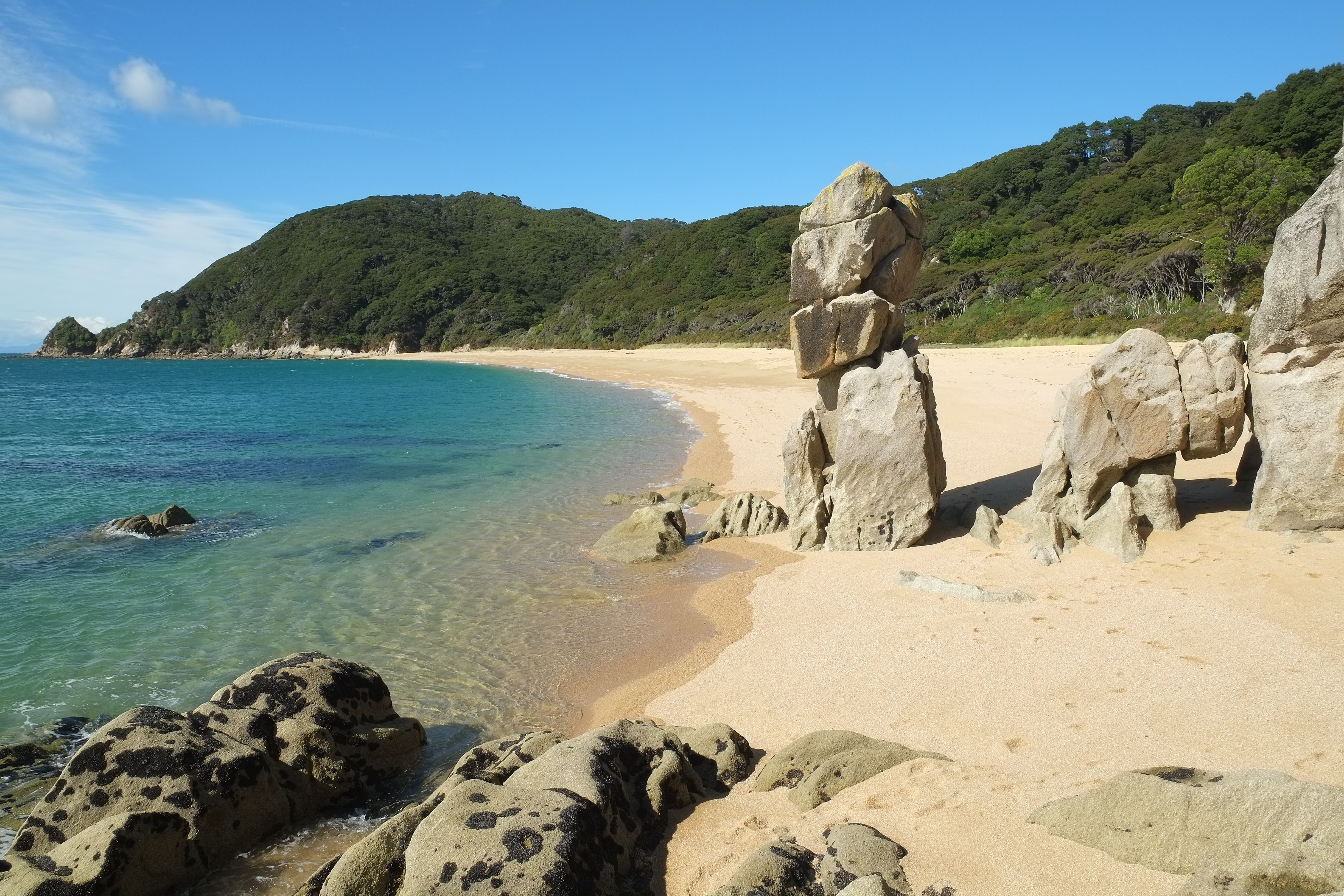 Rock stacks in Anapai Bay